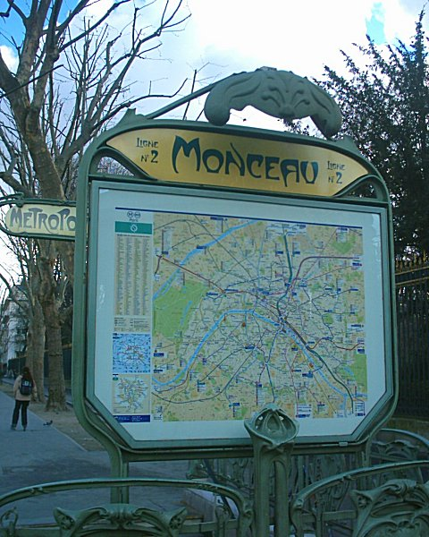 Entrée de la station Monceau du Métropolitain de Paris.